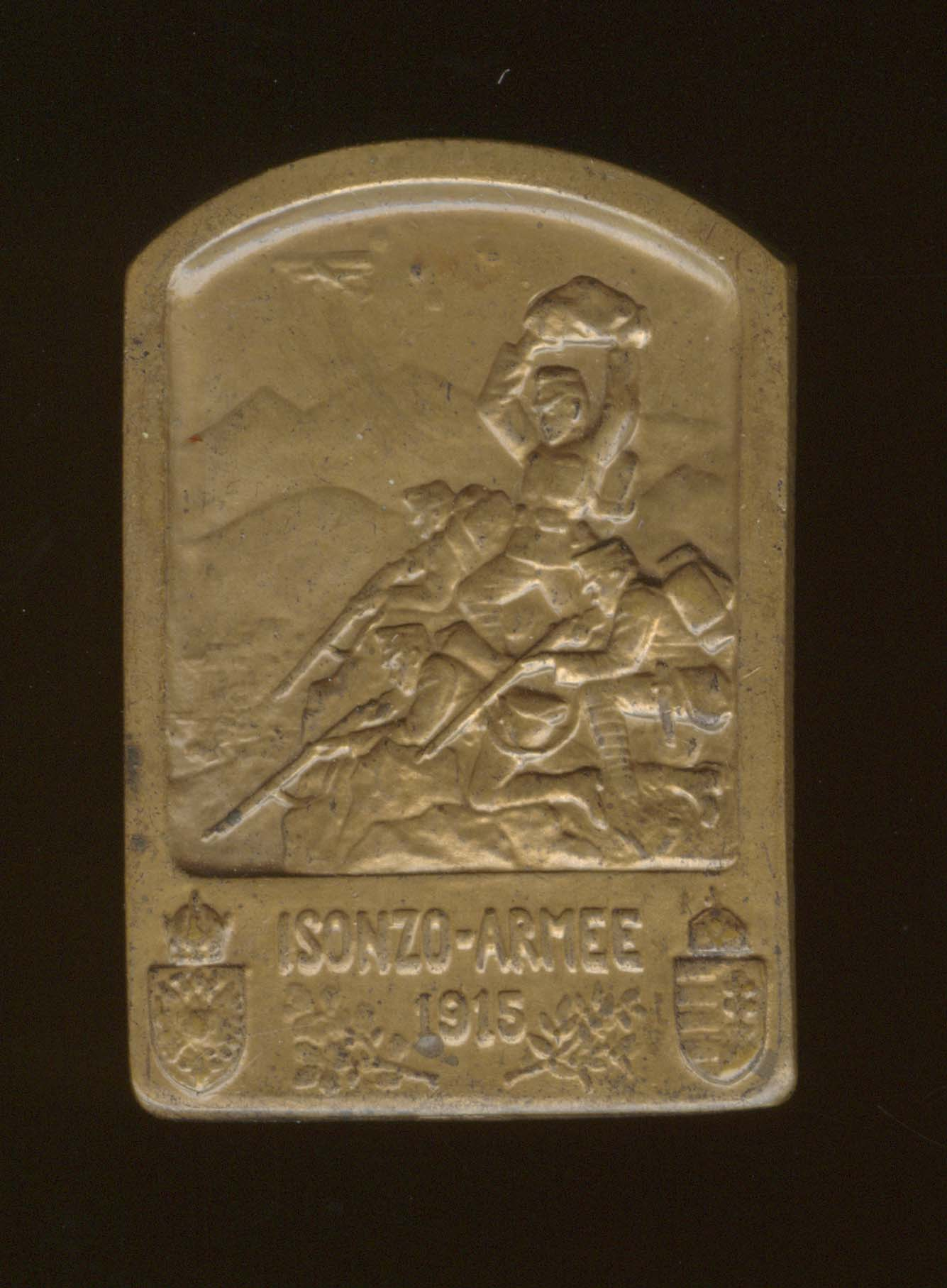 Kappenabzeichen, distintivo da berretto austro-ungarico della collezione del Museo Storico Italiano della Guerra di Rovereto